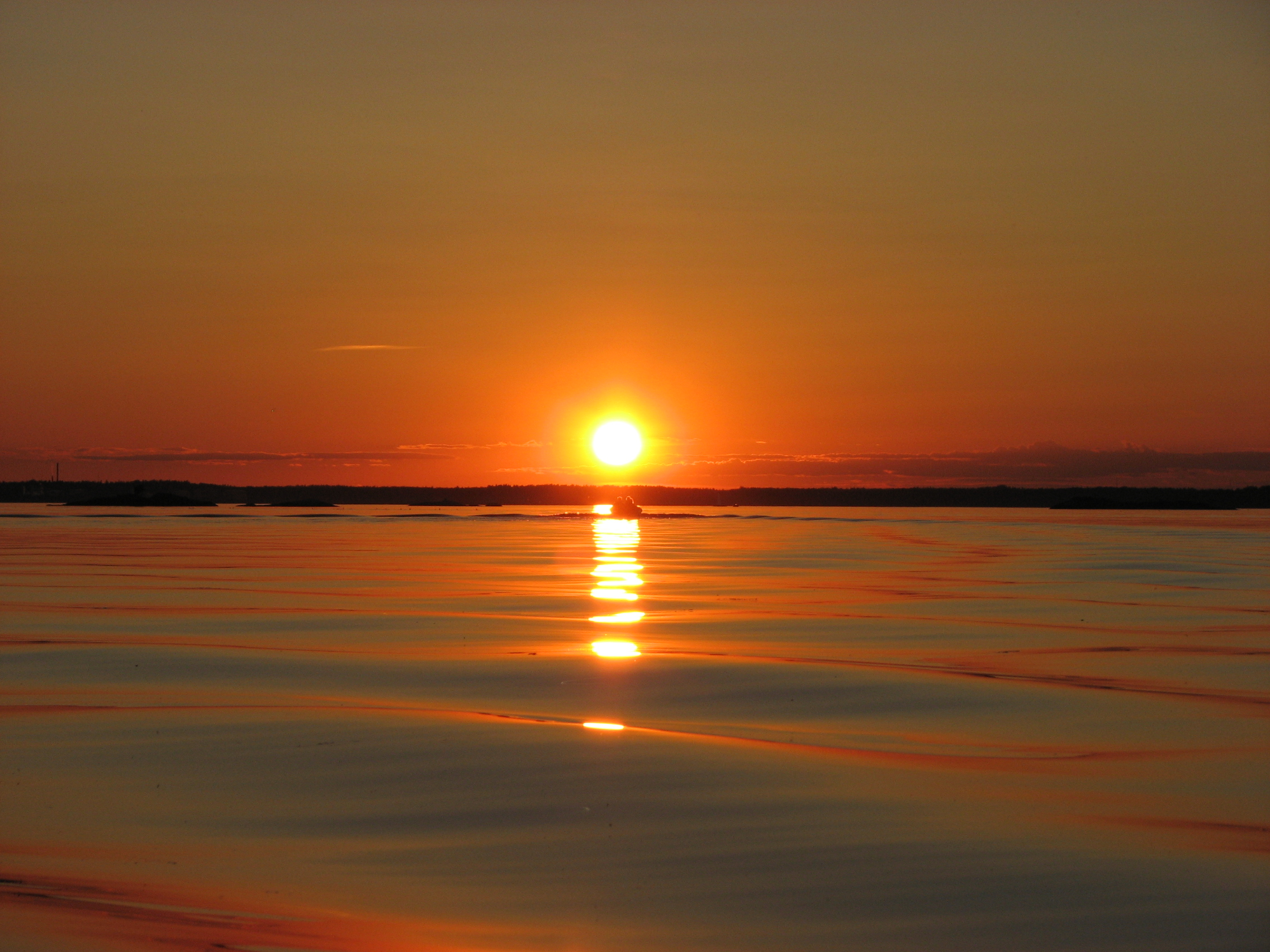 En underbar sommar kväll, solnedgång över Mysingen .kortet är taget från gamelhamn.